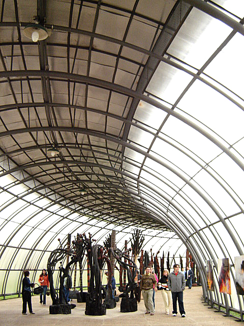 Inaugurado no Jardim Botânico, com a presença ilustre do artista polonês de 82 anos, o espaço abriga mais de 100 esculturas doadas por Krajcberg ao município. Recolhendo do mangue e da floresta em Nova Viçosa os materiais com que trabalha, Krajcberg faz de sua obra um grito em favor da preservação da natureza. Cipós, troncos de madeira queimada são a matéria-prima de suas criações, sempre no sentido no sentido de despertar a indignação contra as ações devastadoras do homem. Além de Curitiba - a primeira cidade a inaugurar um espaço dedicado ao artista ? Paris também terá em breve o seu Museu Frans Krajcberg, assim como a cidade de Nova Viçosa, na Bahia, onde ele fixou residência há 30 anos. Entre as obras que compõem o acervo do novo espaço estão esculturas, relevos e fotografias, além de vídeos, textos e publicações que serão a base para futuras ações educativas e servirão para a formação de um centro de documentação. Nas palavras do artista, ?será um local de encontro, de reflexão, de proposições, de troca livre de idéias, de registro delas e de difusão do conhecimento alcançado. As obras devem ser o ponto de partida para a reflexão sobre as relações do homem com a natureza, sobre a arte e o meio ambiente?. Espaço Cultural Frans Krajcberg - Jardim Botânico Horário: diariamente das 9h às 12h e das 13h às 18h Ingresso: Domingos: 1 Real e Quarta-feira: entrada franca Outros dias: inteira R$ 3,00 e meia R$ 1,50 Local: Jardim Botânico - Rua Ostoja Roguski